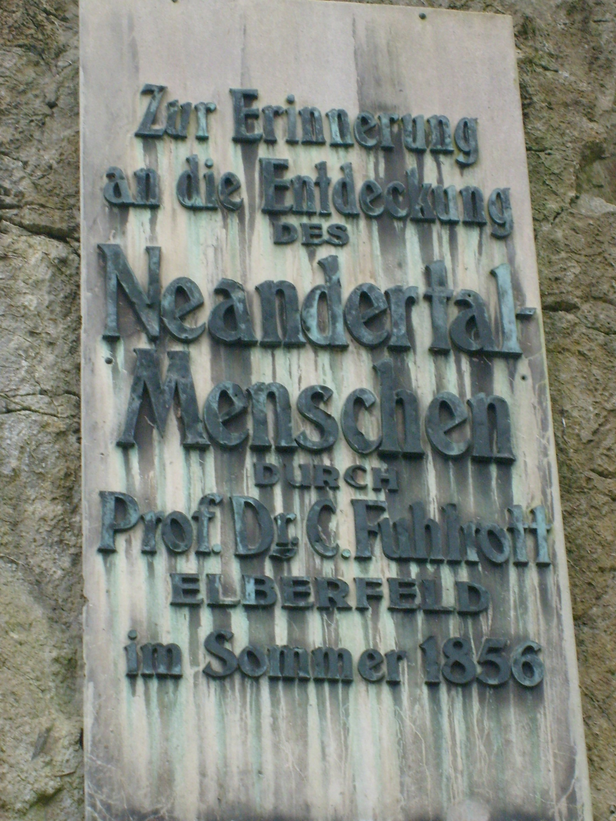 Nahaufnahme der 1926 am Rabenstein angebrachten Tafel, die an den Fund des Neandertalers 1856 erinnert